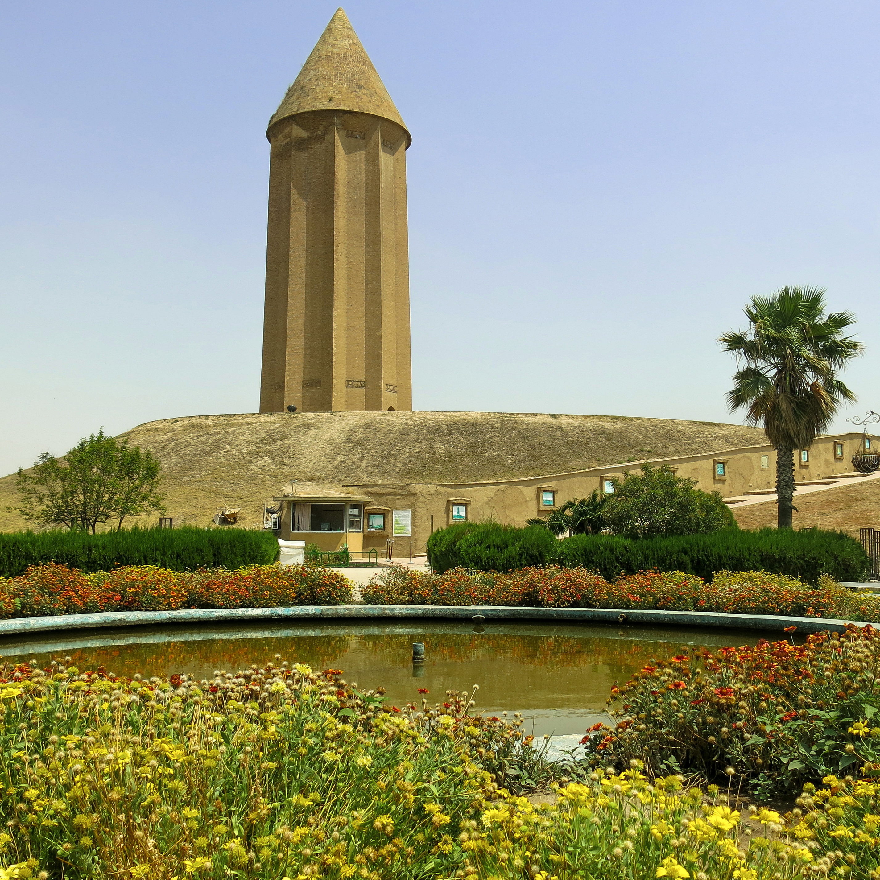 گنبد قابوس